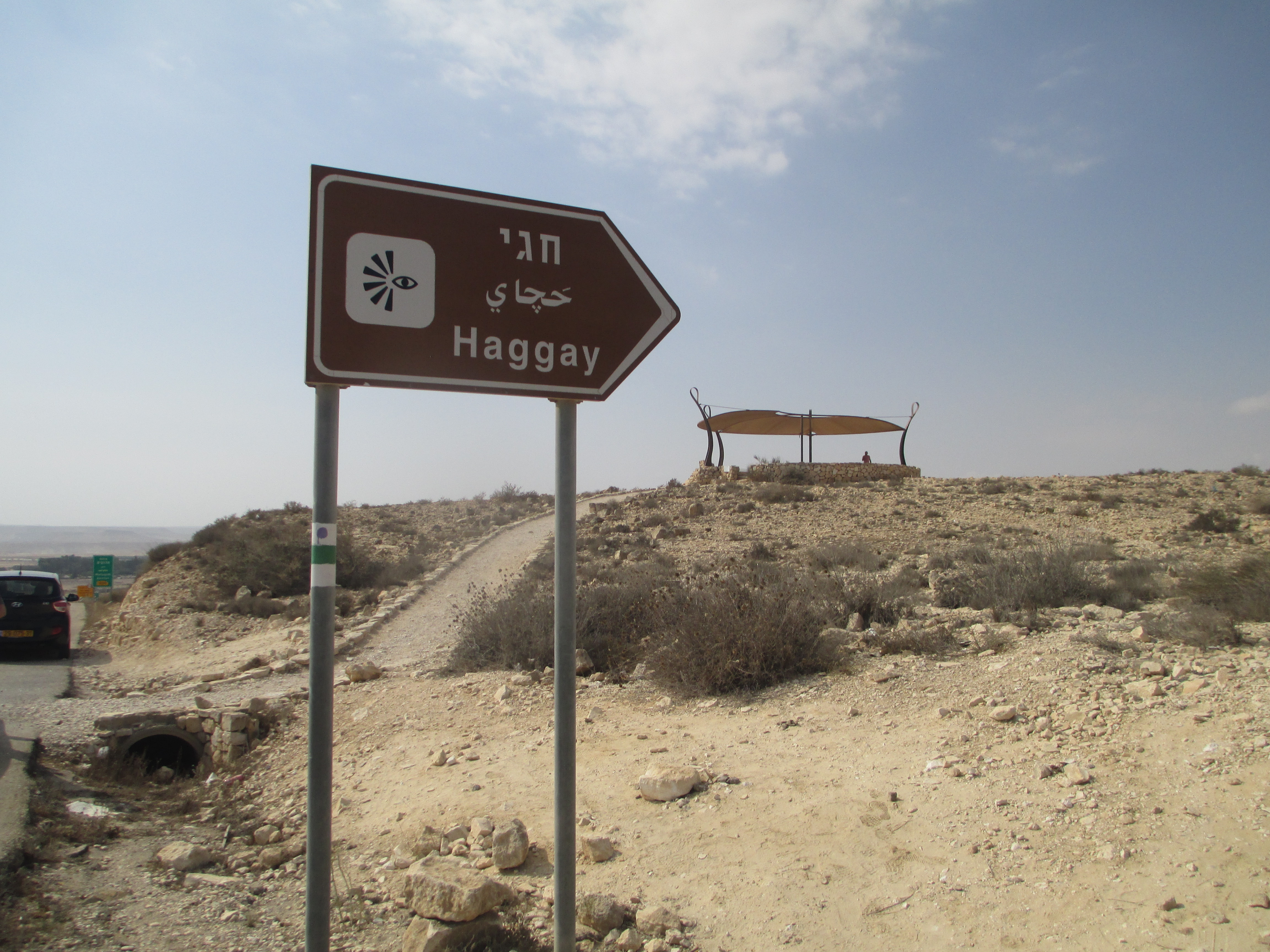 מצפור חגי